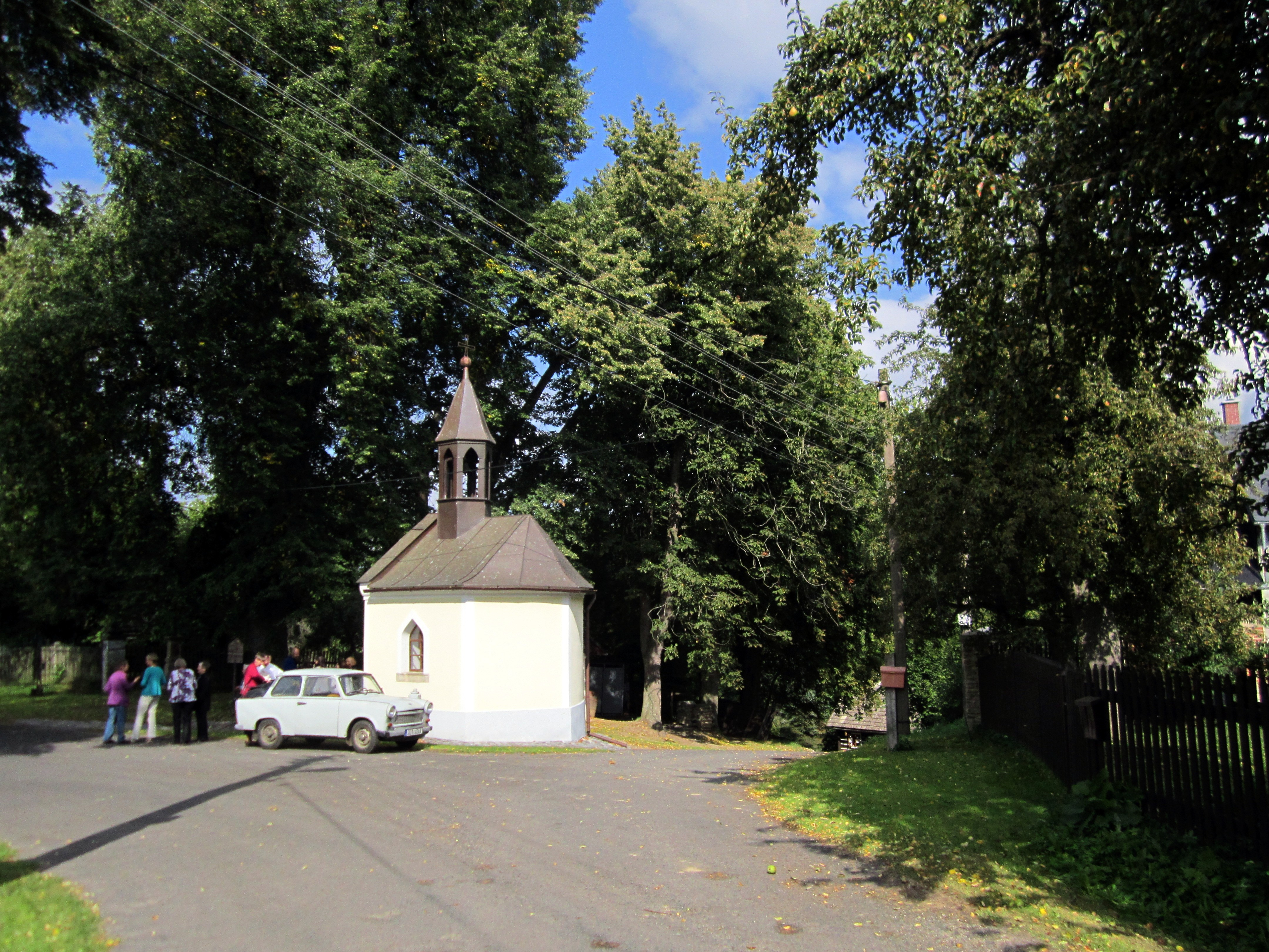 Pohled od jihu na padařovickou kapli sv. Jana Nepomuckého z roku 1865 uprostřed vesnice.